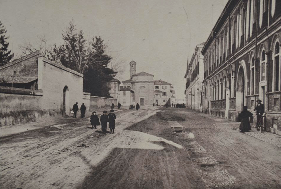 La via fratelli d'Italia a Busto Arsizio in una foto d'epoca. In fondo alla strada si nota il Tempio Civico; sulla destra palazzo Gilardoni e, più vicino al fotografo, casa Candiani, oggi demolita.